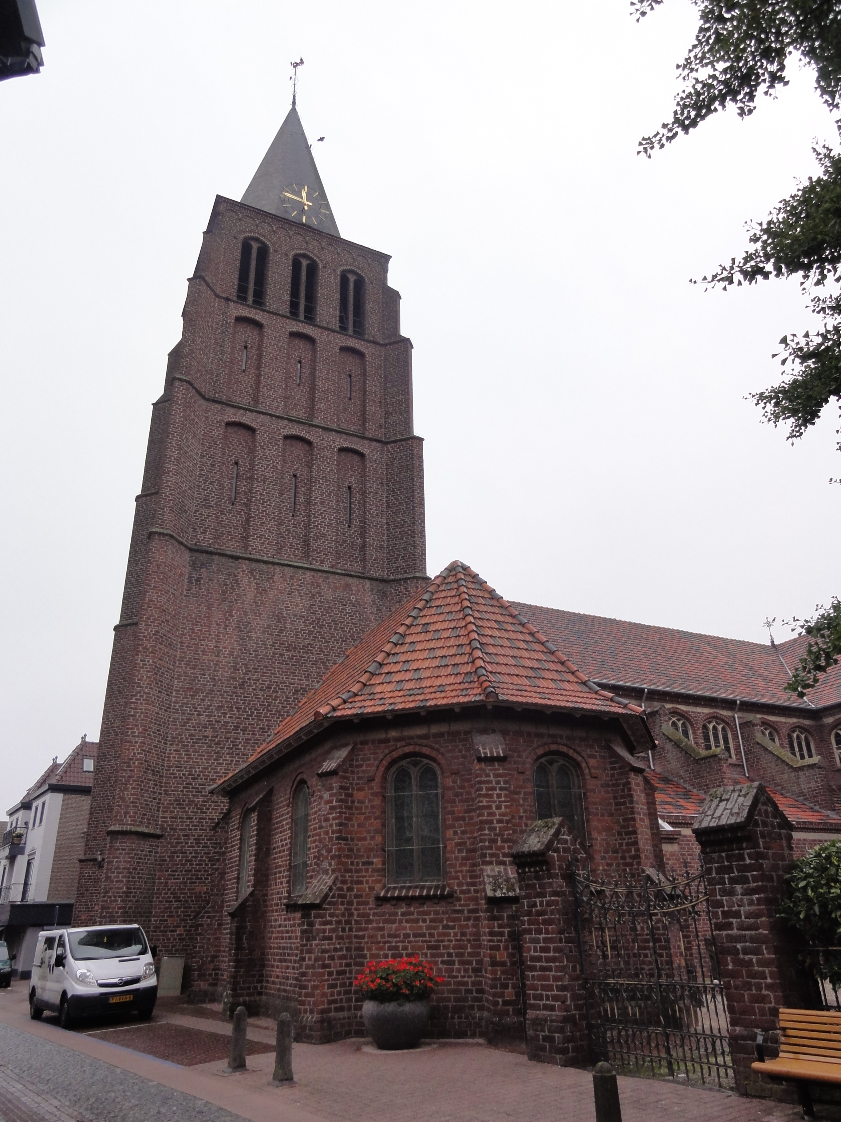 Boxmeer Rijksmonument 10032 kerk, Steenstraat 41 48″ N, 5° 57′ 10.78″ E